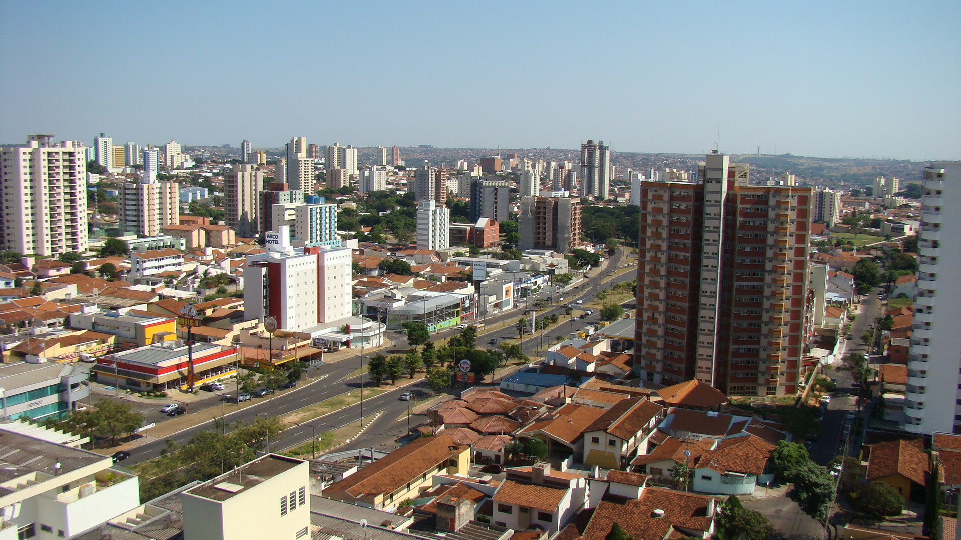 Vista panorâmica da região da avenida Nações Unidas, em Bauru, São Paulo, Brasil.